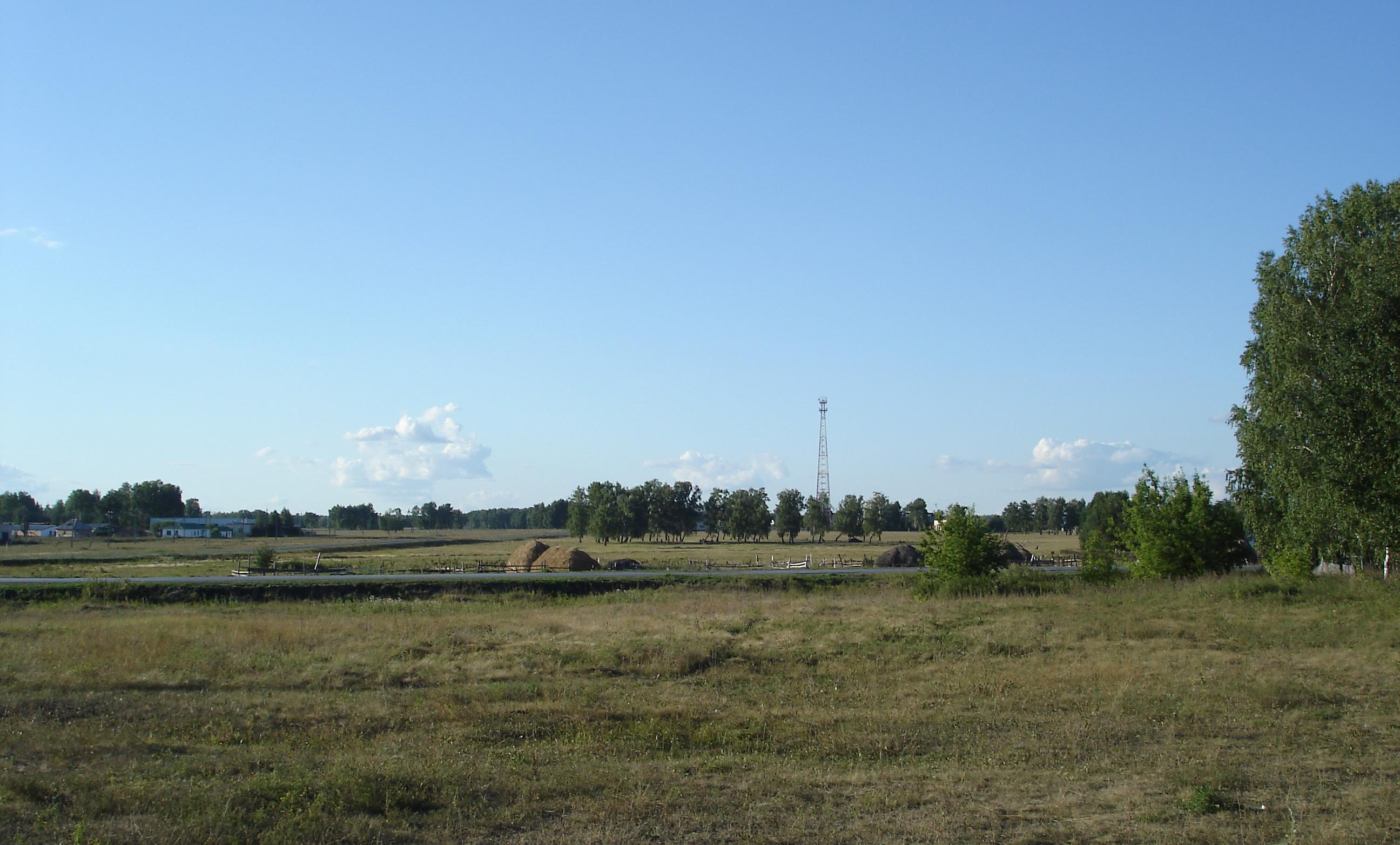 Природа на окраине Мишкино